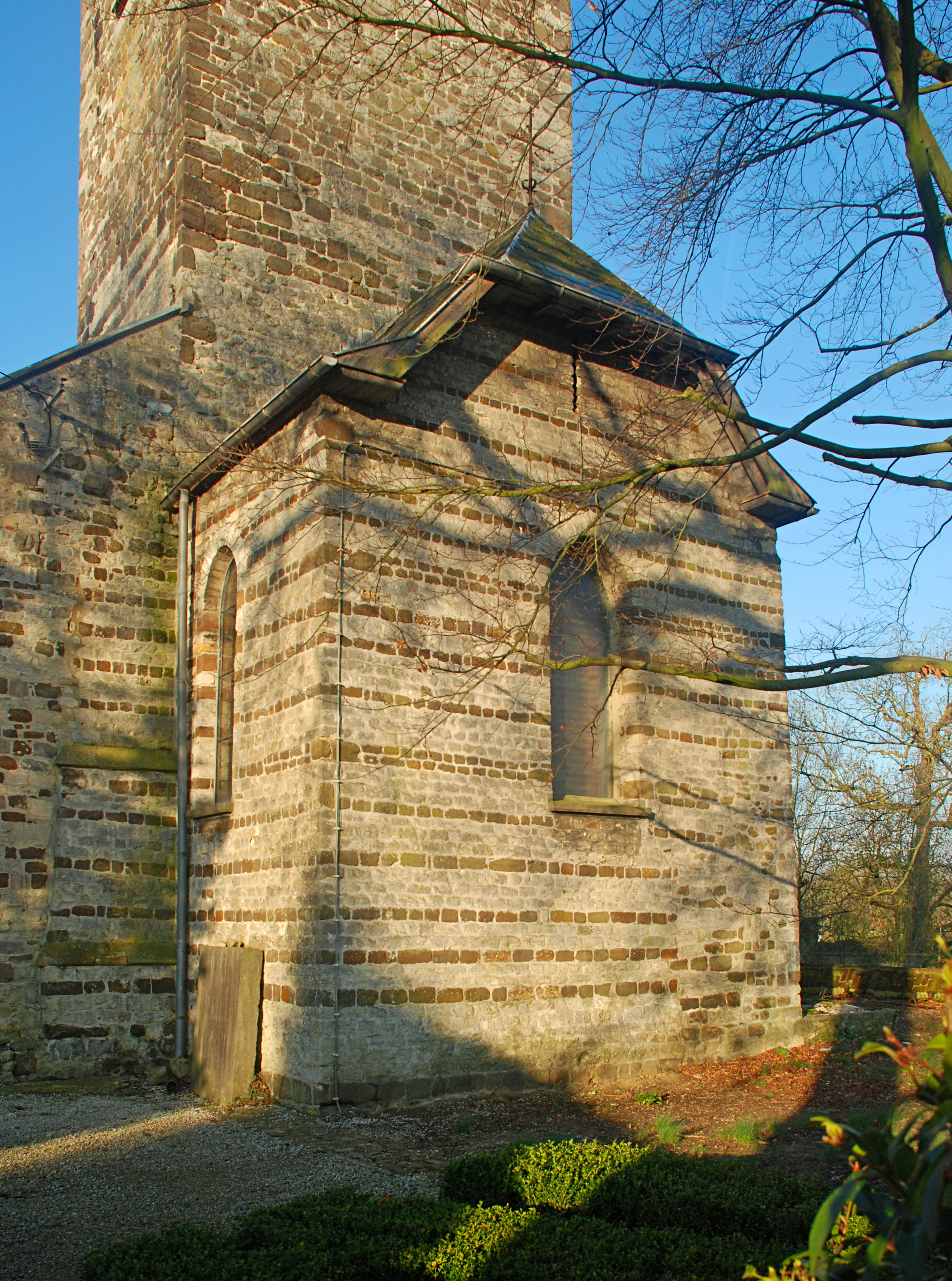 Belgique - Brabant wallon - Chaumont-Gistoux - Église Saint-Bavon de Chaumont